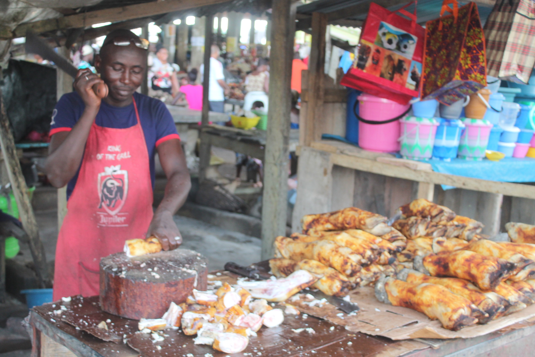 Boucher de porc fumé à Aboisso découpant sa viande This is an image of "African people at work" from Ivory Coast